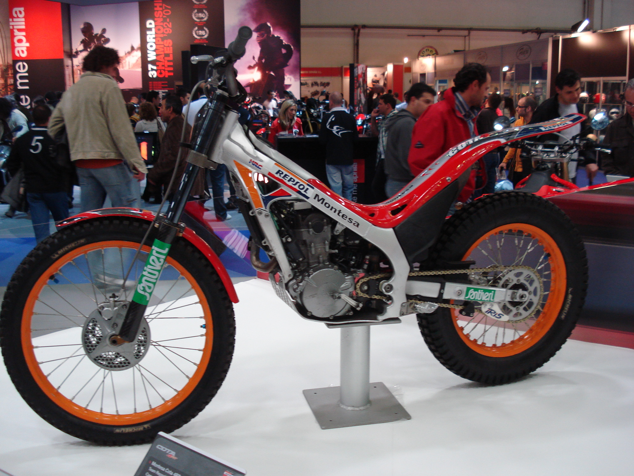 TONI BOU - MOTOH BCN Montesa COTA 4RT